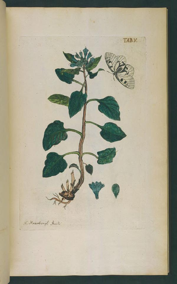 Afbeeldingen van zeldzaame gewassen /door Nicolaas Meerburgh ...